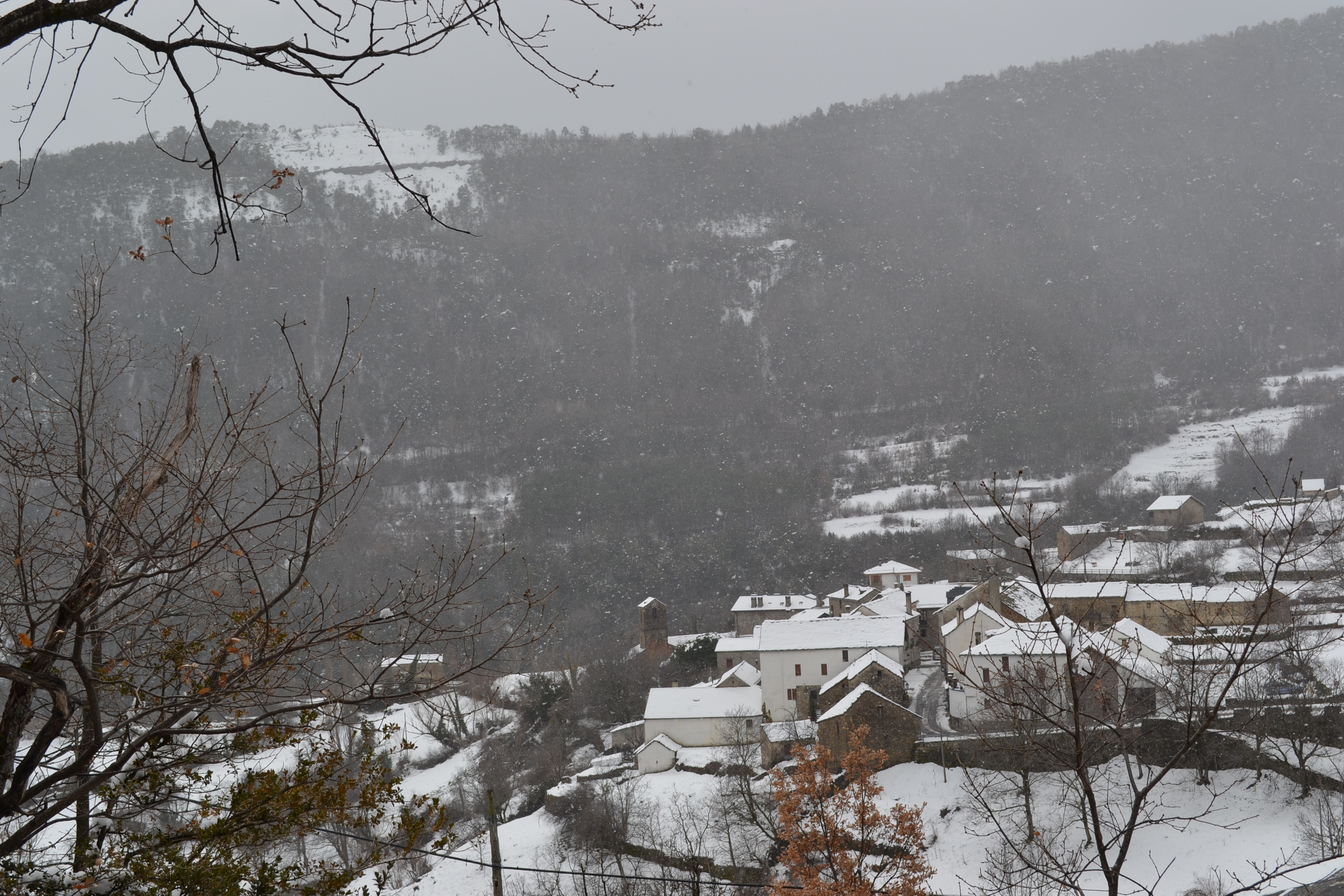 vista panorámica